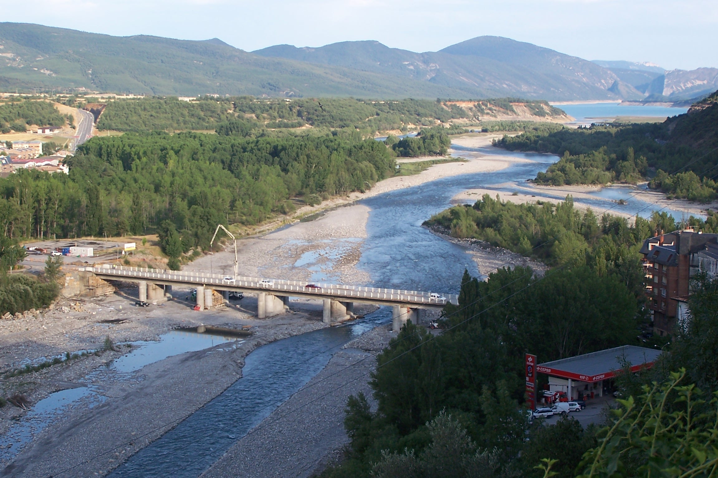 Eigen werk 28-06-2006